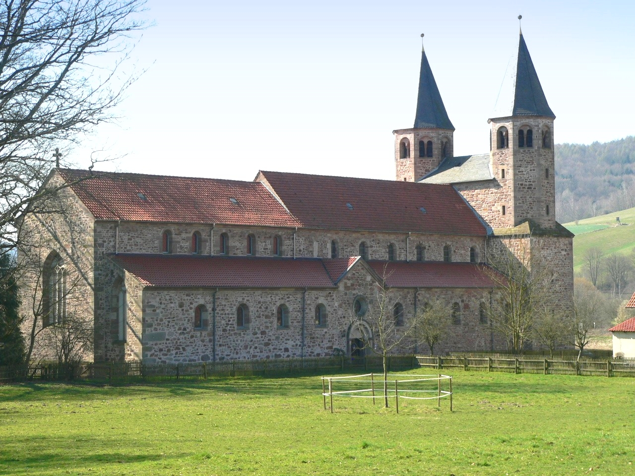 Doppelkirche des ehemaligen Benediktiner-Klosters Bursfelde an der Weser